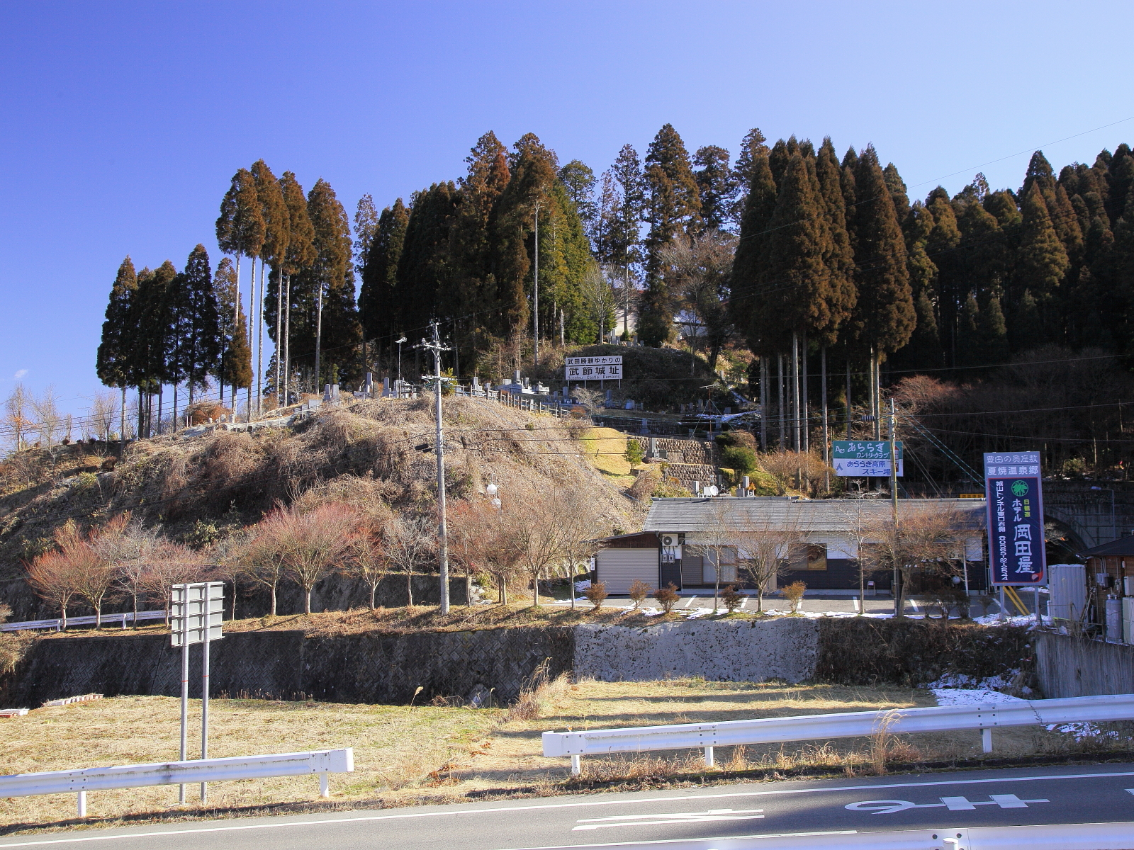 豊田市指定文化財（史跡） 武節城址（豊田市武節町、2012年）